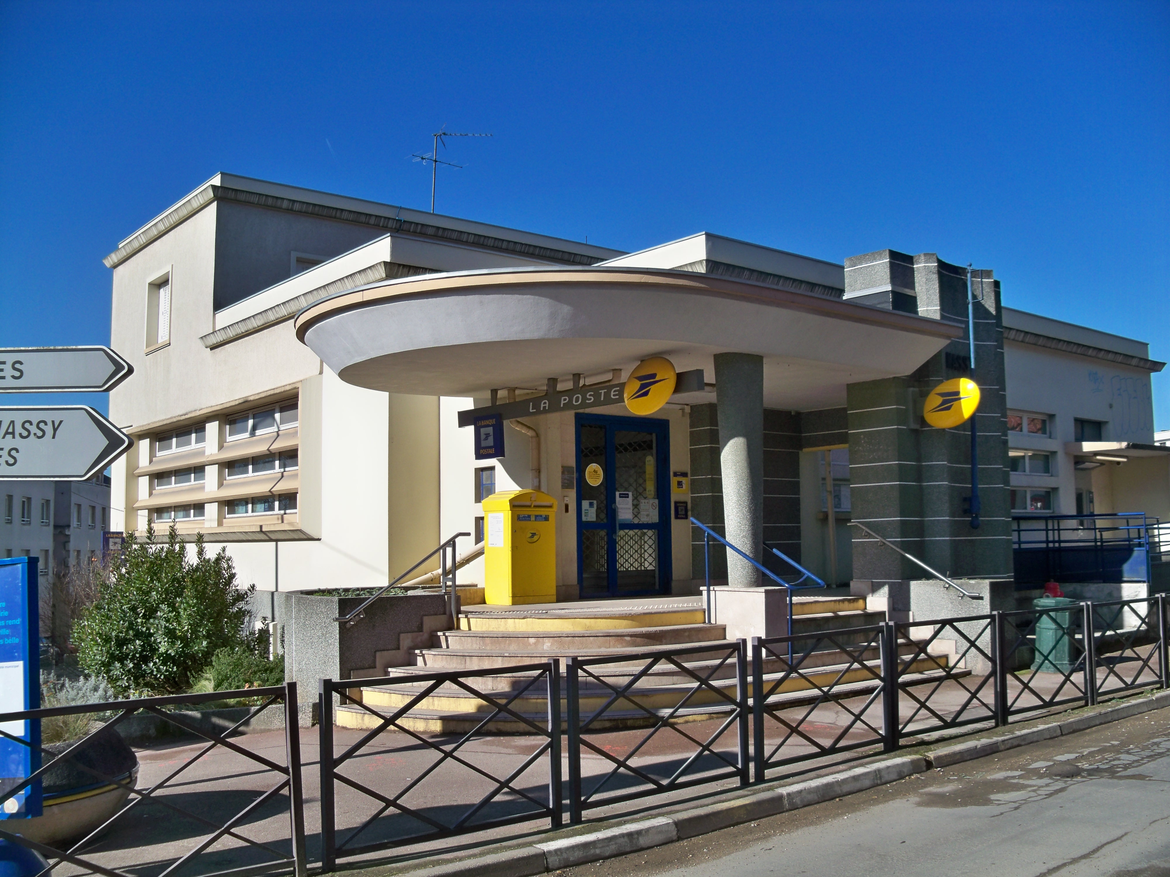 Bureau de poste de Massy centre